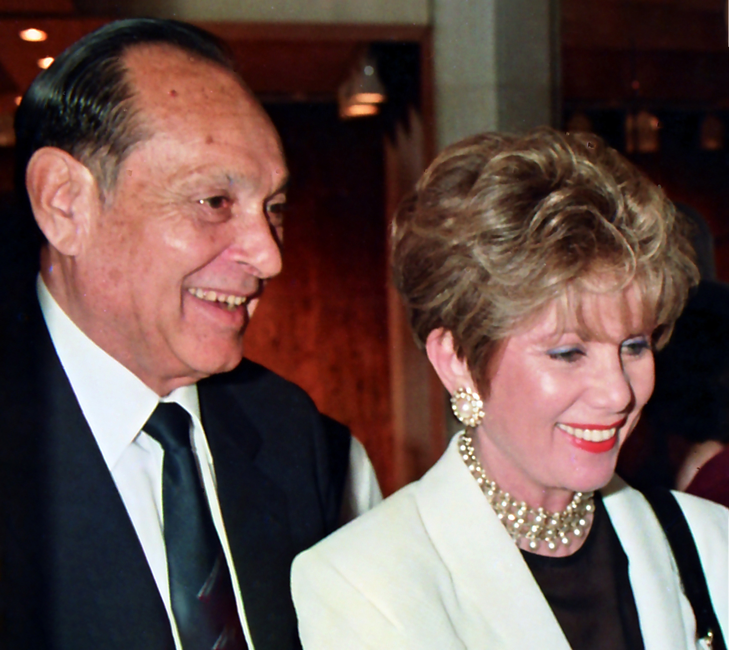 מיכל ויצחק מודעי